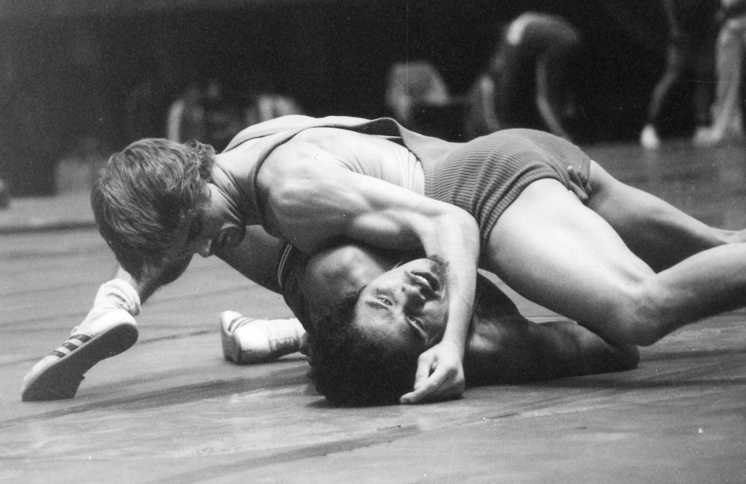 Gerhard Sattel (oben) - WM-Kampf in Mexico City (1978)